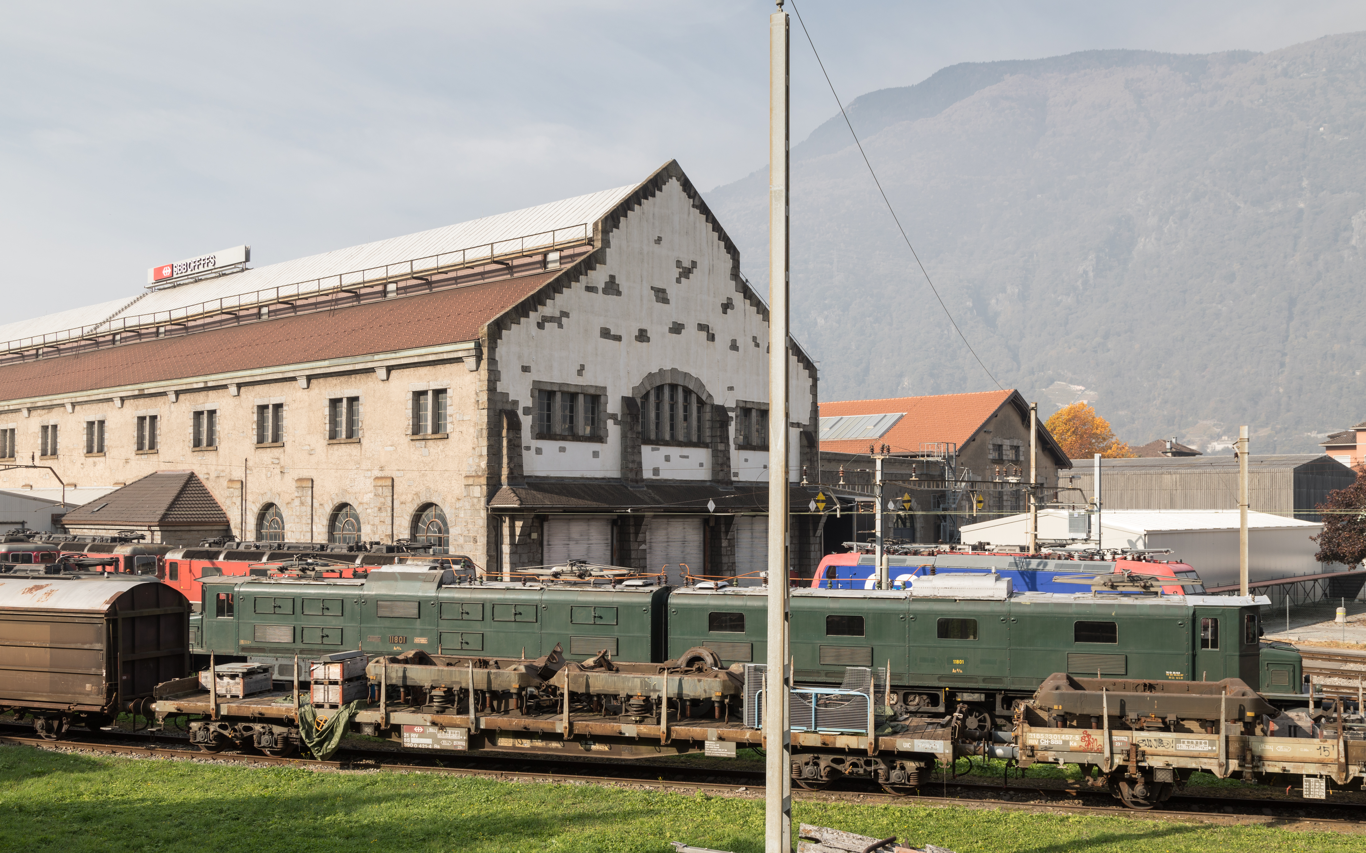 SBB Ae 8/14 und andere auf dem Gelände der Werkstätte Bellinzona